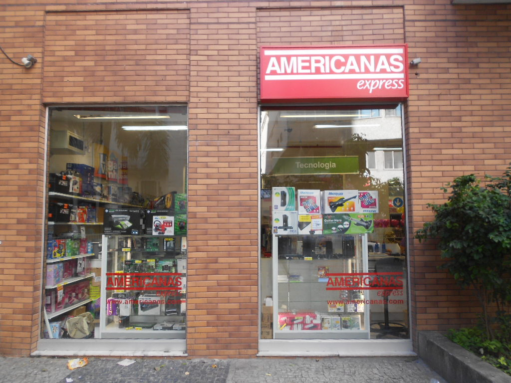 Filial da Lojas Americanas situado na Rua Riachuelo, na Lapa, Rio de Janeiro, Brasil.